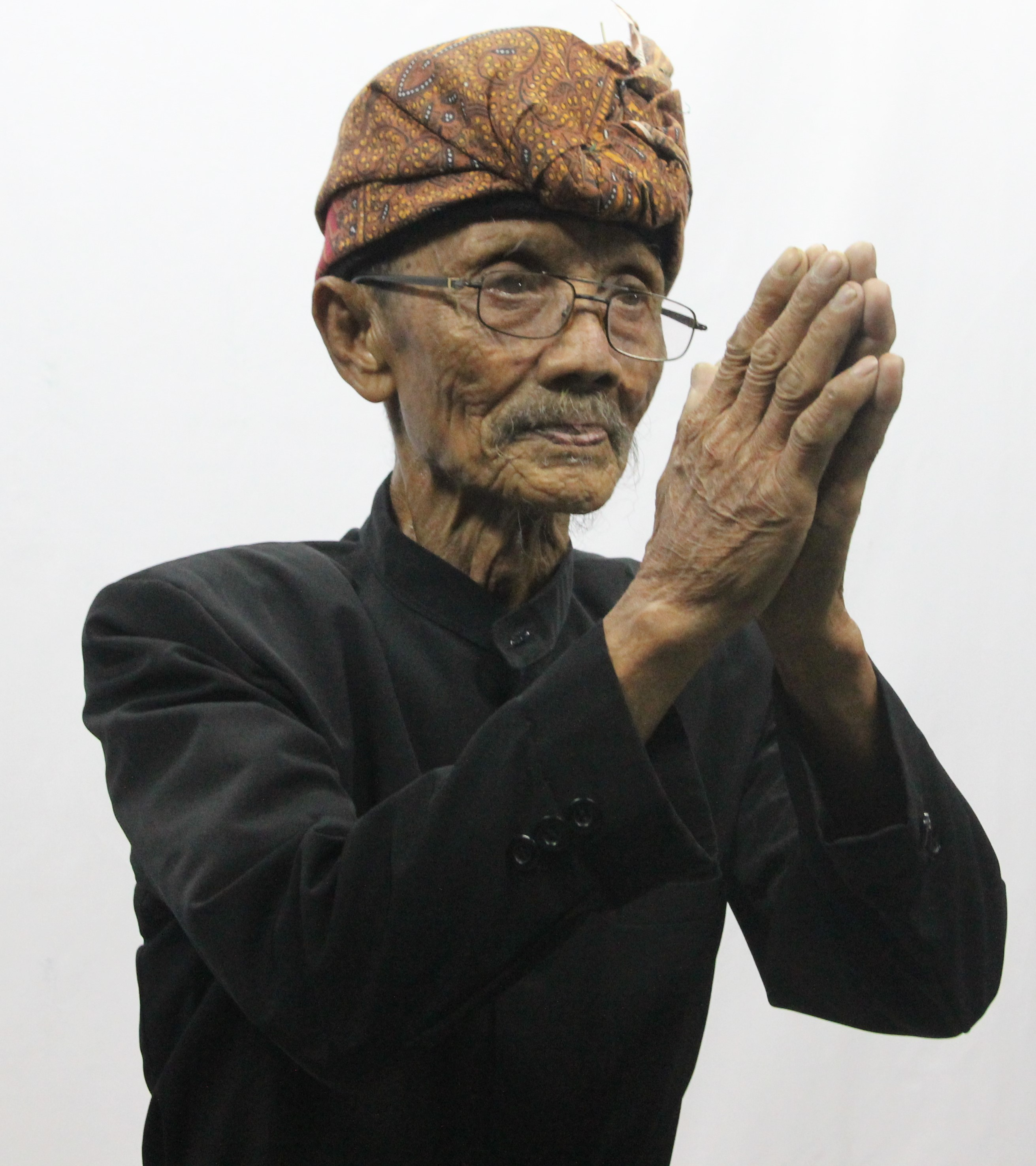 Molubo adalah sikap hormat bagi pelangga untuk menghormati Tuan Guru, teman seperguruan maupun lawan.